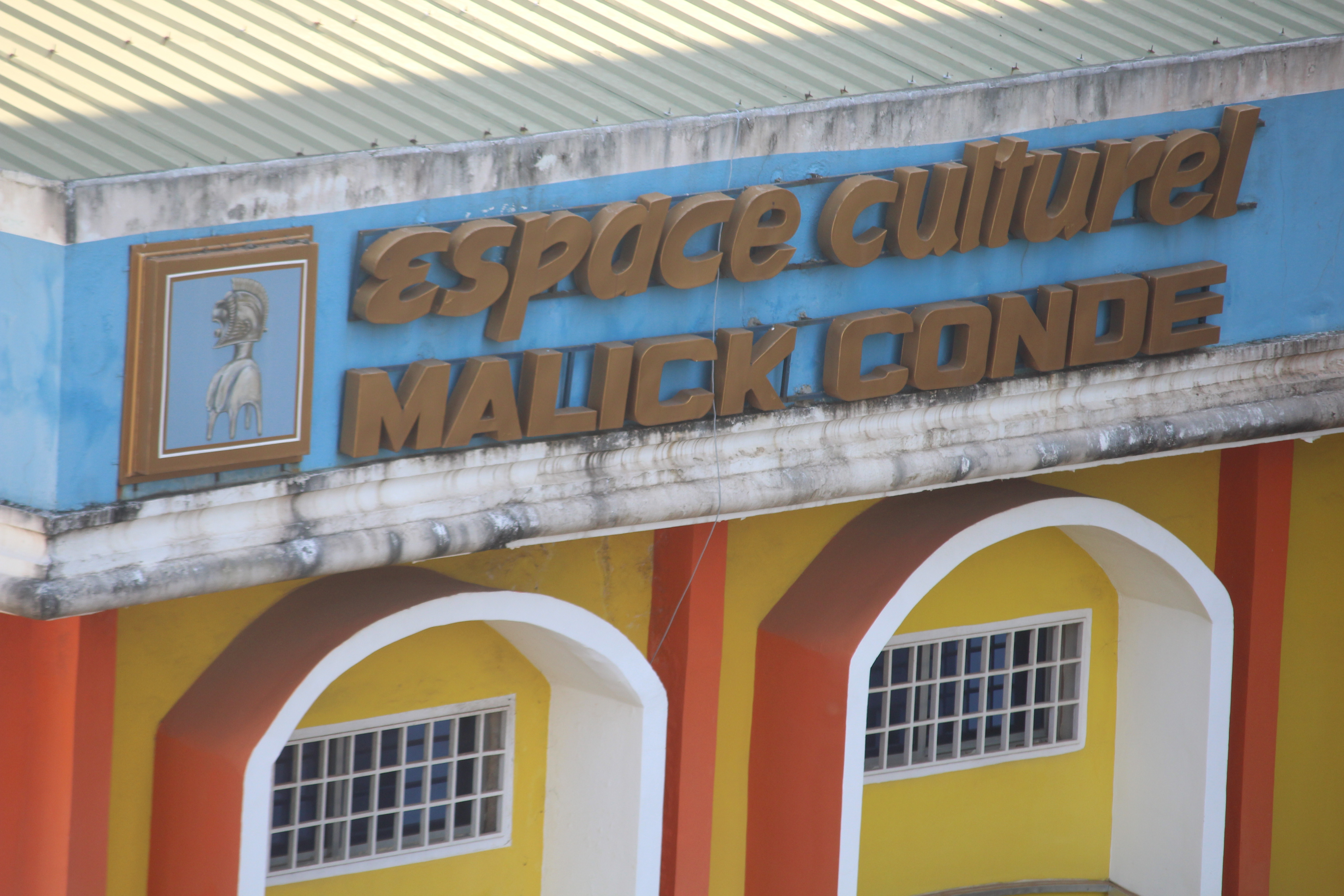 Espace culturel malick Condé de l'université kofi annan de Guinée